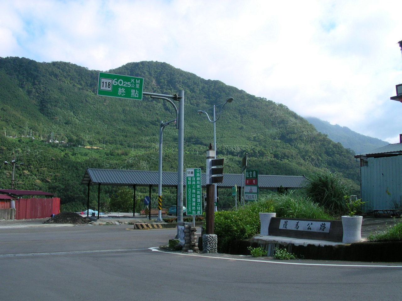 臺灣羅馬公路終點，亦為市道118(拍攝當時是「縣道118」)終點。